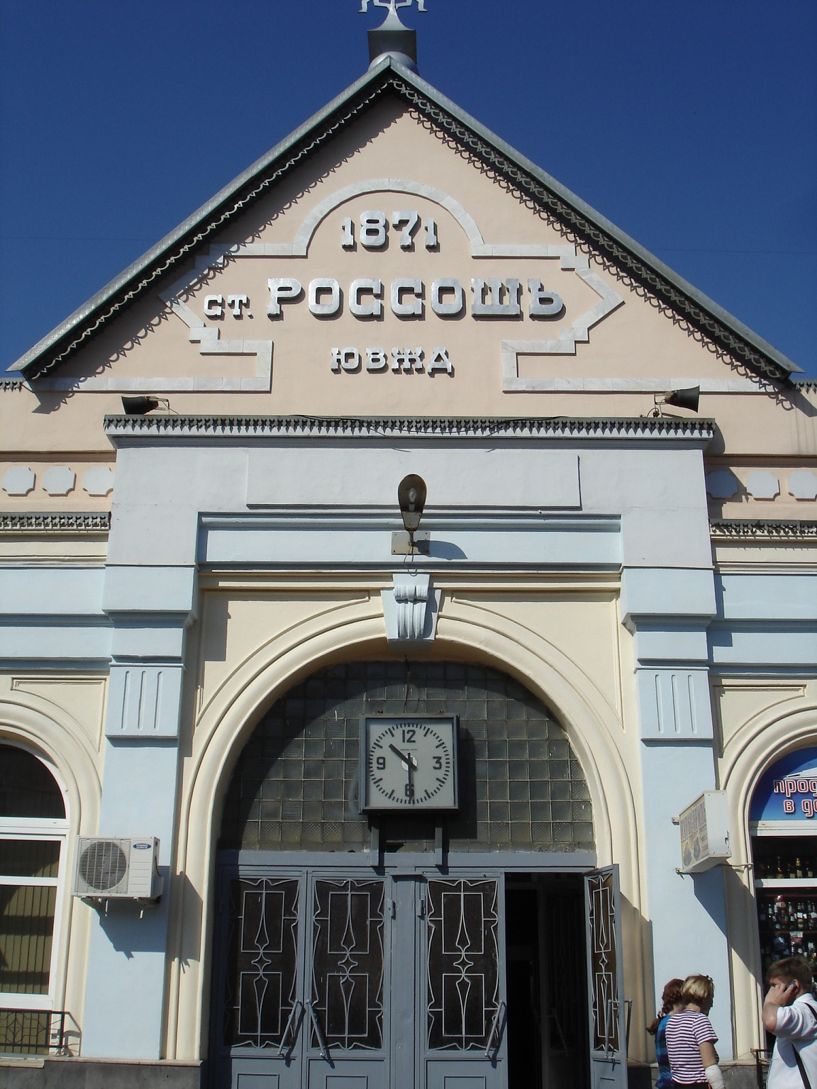 Фронтон вокзала станции Россошь с выходом на перрон